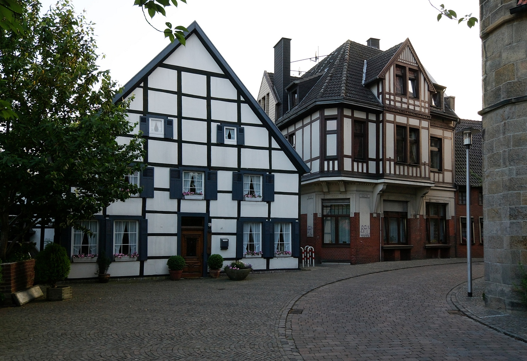 Hamm-Bockum-Hövel